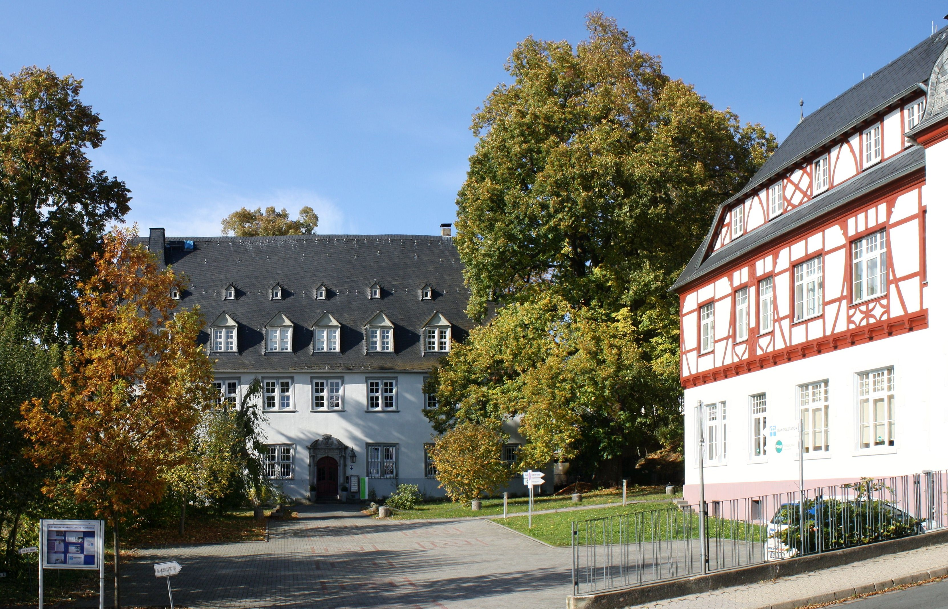 Das Barockschloß und Kunstdenkmal Sohlern`sche Hof (Bild links) in Nastätten wurde langwierig und aufwendig saniert. Freiherr Johann Hugo von Sohlern († 1732) aus der geadelten Familie SOHLERN, war der Gründer der Linie zu Nastätten. Er war verheiratet mit Anna Maria Freiin von Dietz. Bis ins 19. Jahrhundert hatte diese Linie ihren Stammsitz in Nastätten im Klingelbacher Hof, benannt nach Junker Reinhard von Klingelbach. Das freiadlige Hofgut hatte Anton Sohlern 1690 erworben und um- und ausgebaut. Seit dieser Zeit wird das Anwesen Sohlernscher Hof genannt. Bis 1840 blieb es im Besitz der Familie von Sohlern zu Nastätten.